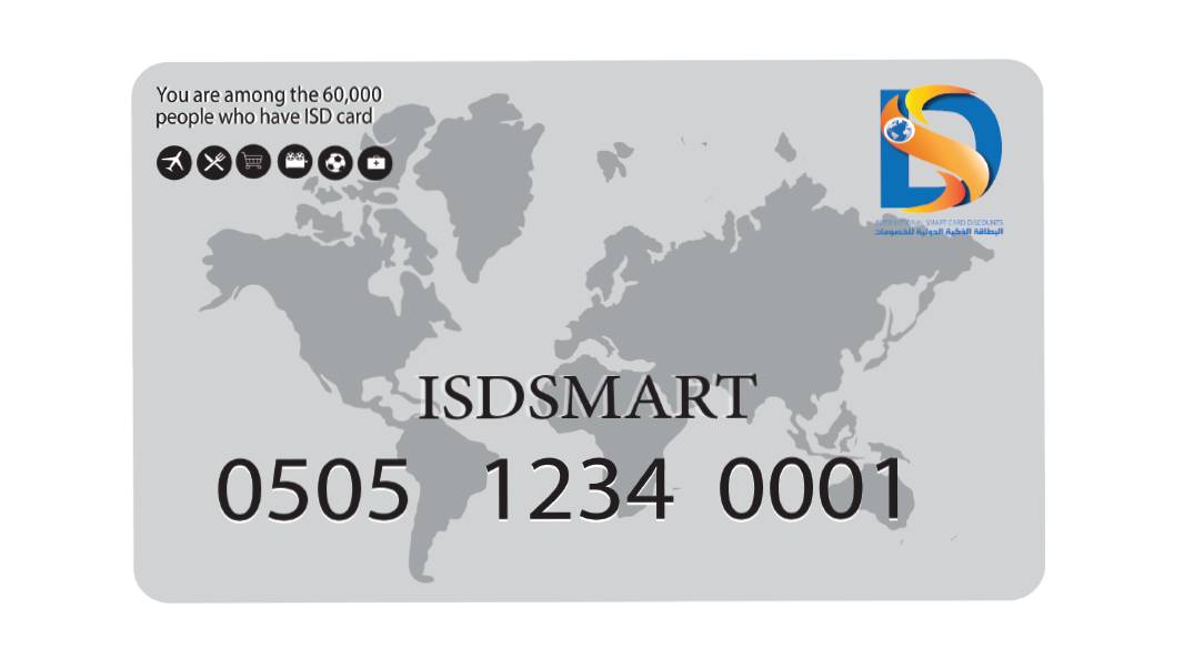 شكل البطاقة الذكية الدولية للخصومات